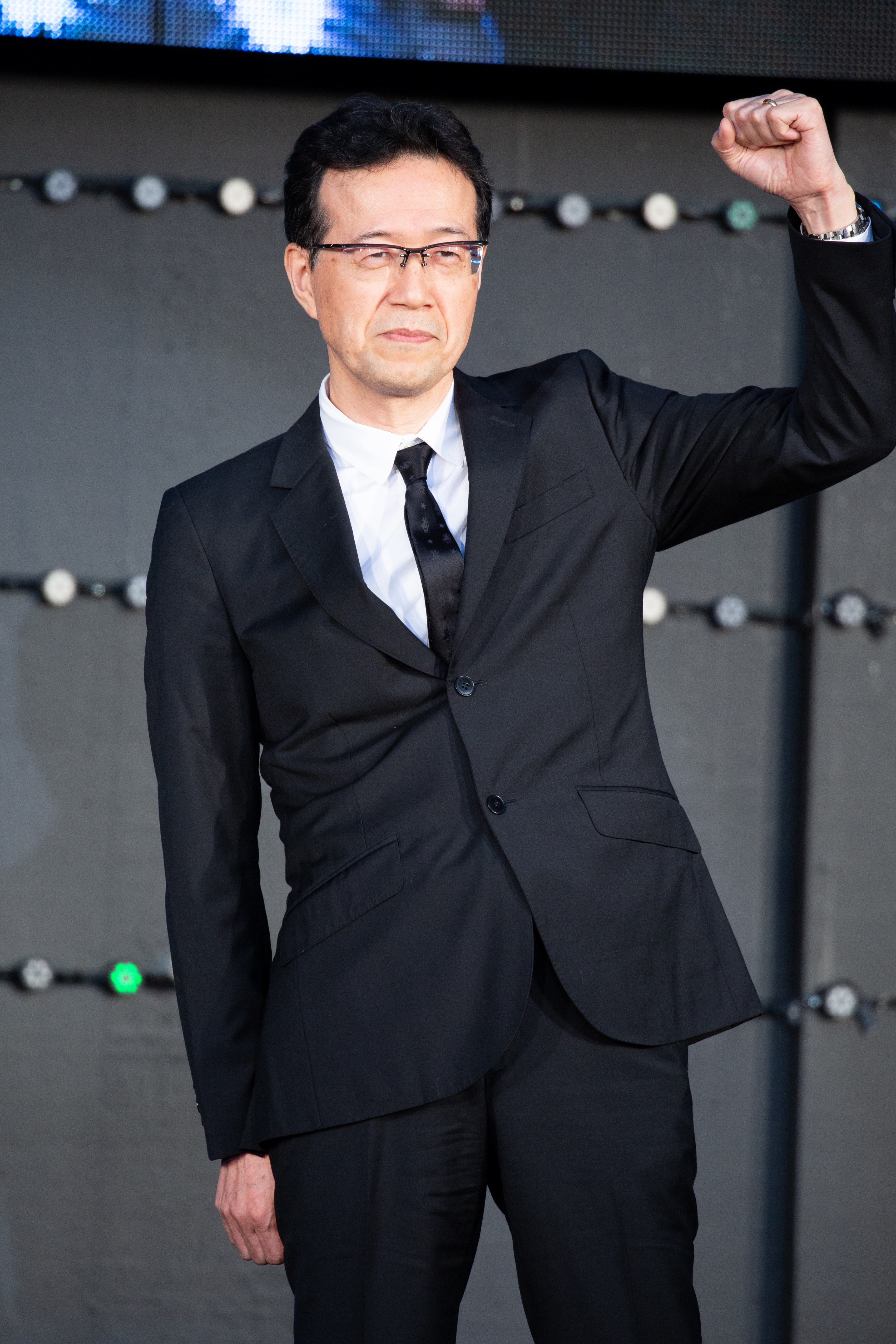 レディ・プレイヤー1 ジャパン・プレミア レッドカーペット 荒牧伸志